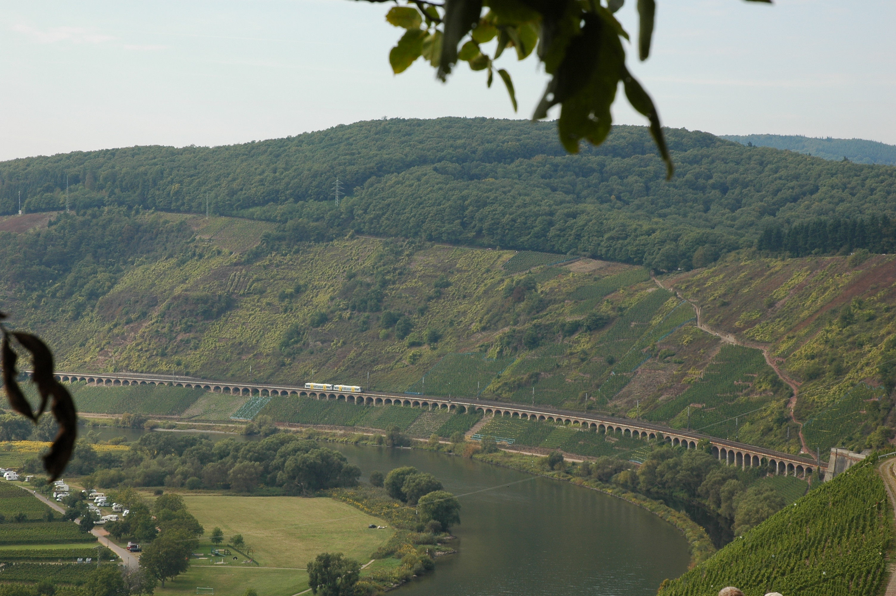 Blick von der Pündericher Marienburg auf das Hangviadukt der Eisenbahnstrecke zwischen Koblenz und Trier